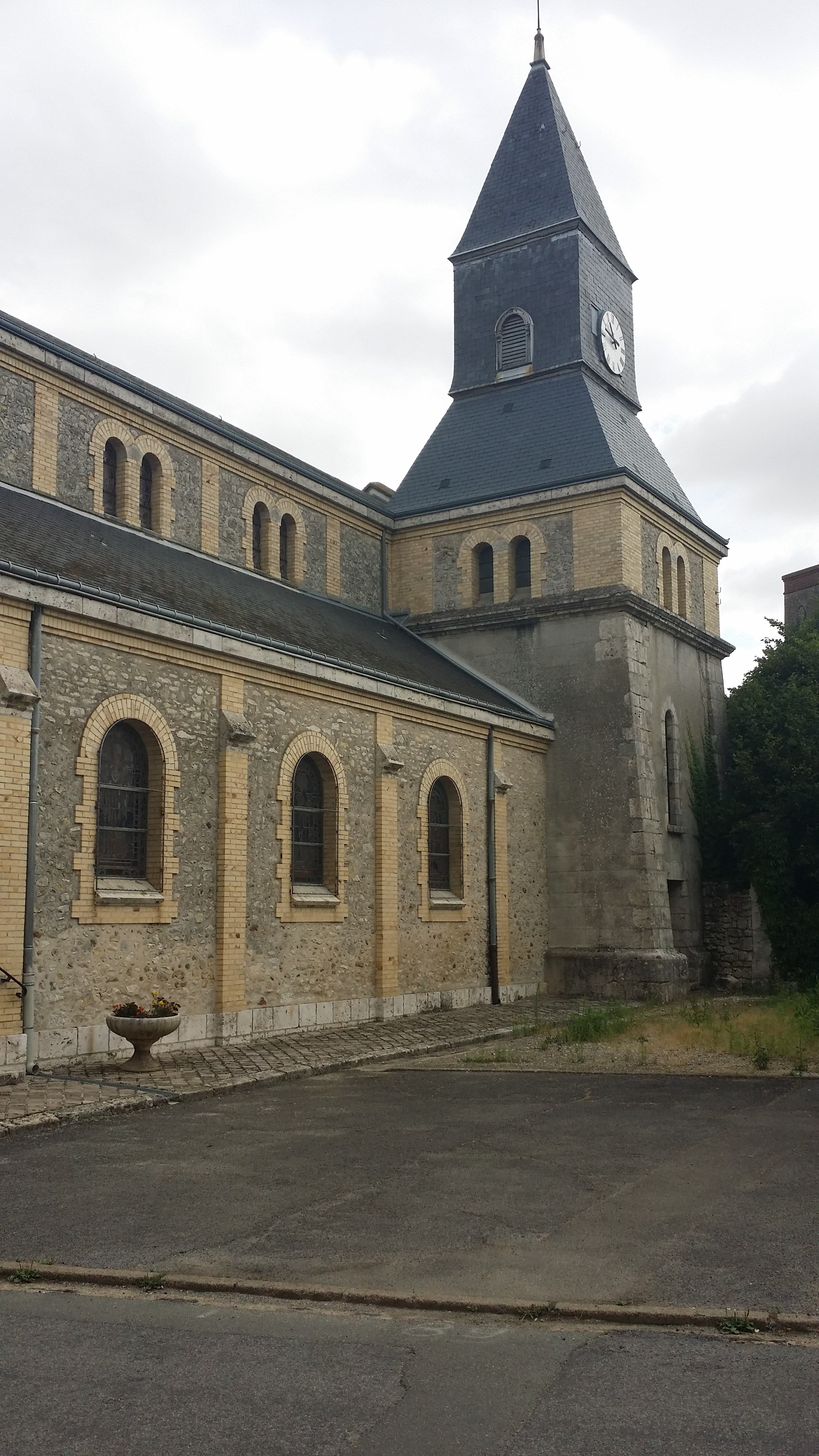 Eglise